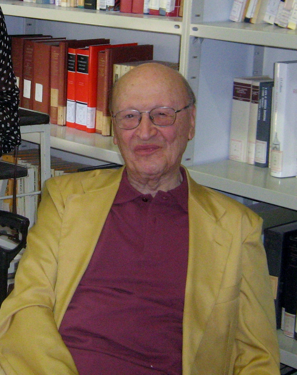 Bruno Gentili nell'Istituto di Filologia Classica di Urbino (giugno 2007)